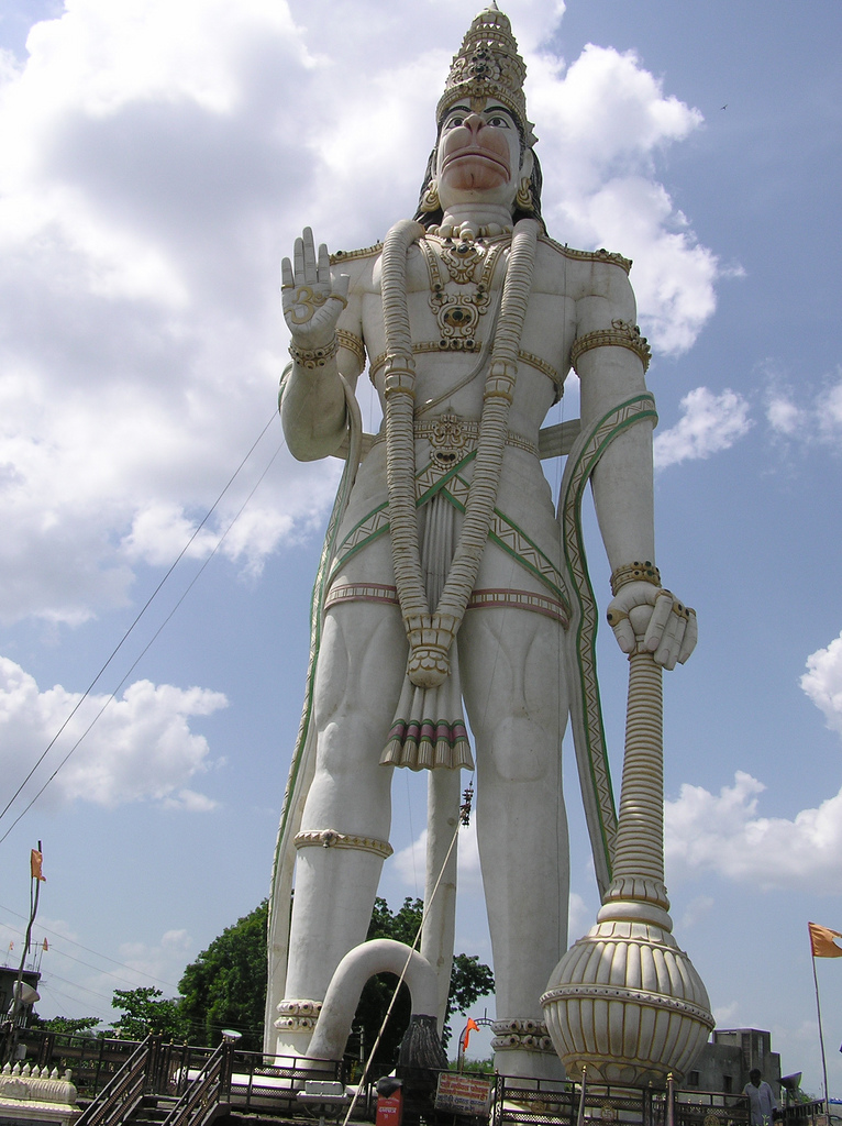 Nandura (Maharashtra), India, 105 ft tall.